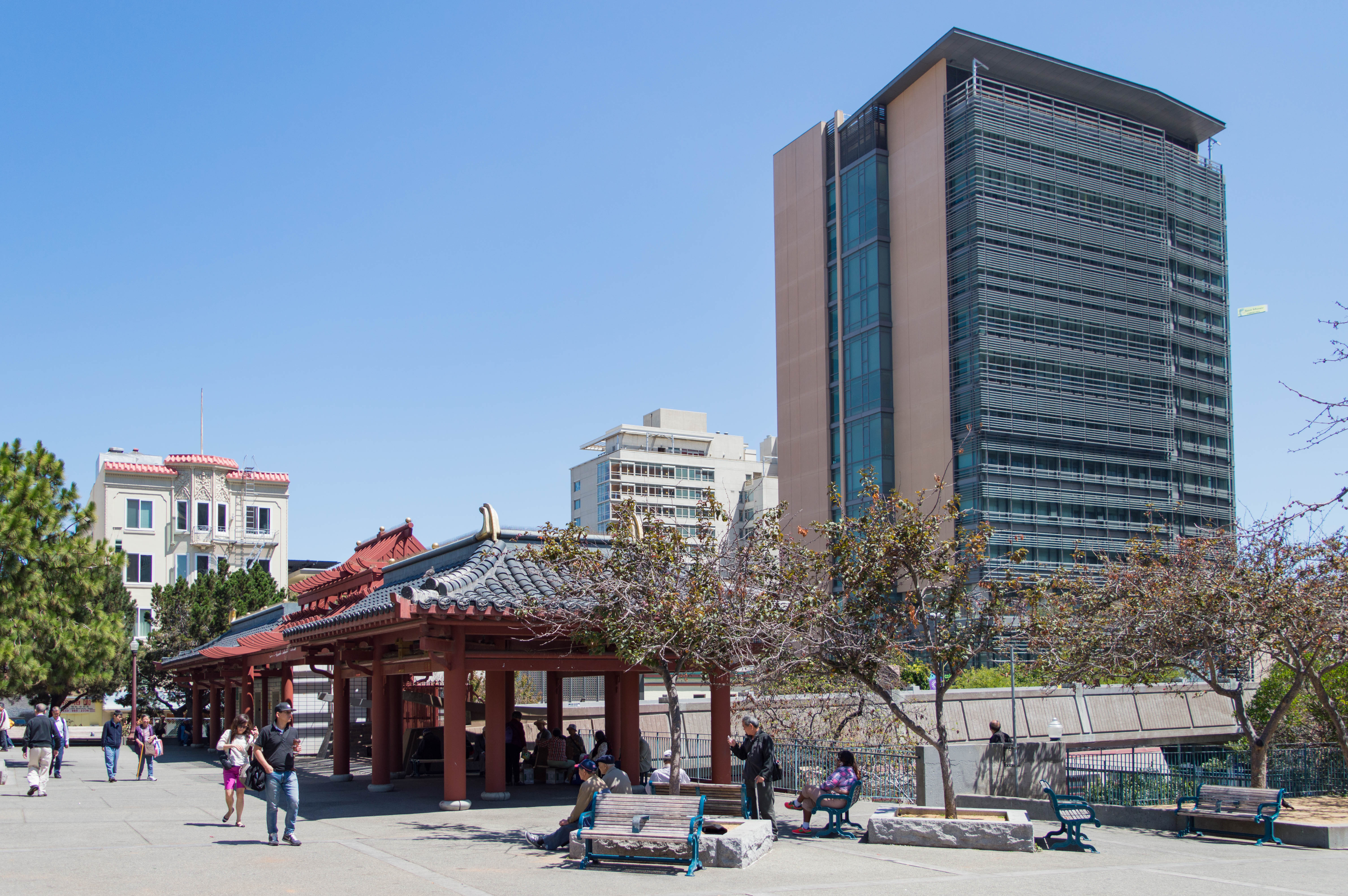 Portsmouth Square in San Francisco and on the right the City College of San Francisco North Beach/Chinatown Center.